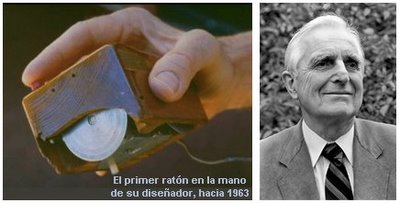 foto de el inventor del mouse y el respectivo mouse que creó